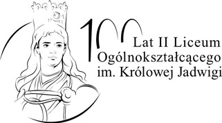 Logo 100-lecie II LO Pabianice